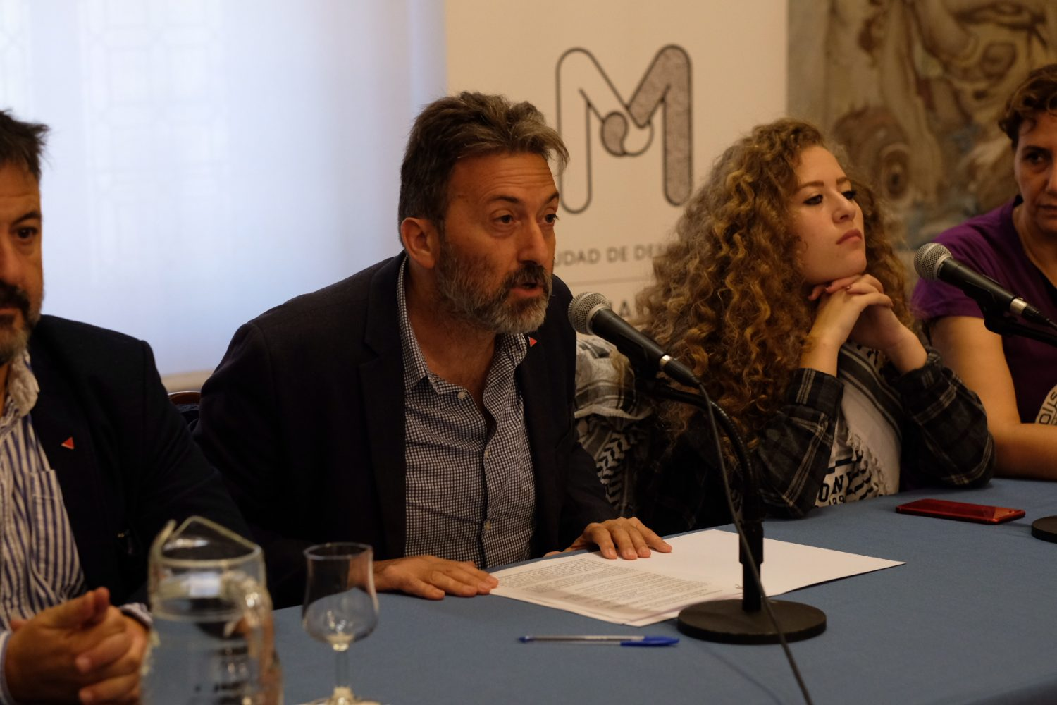 El tercer teniente de alcalde Mauricio Valiente, se ha reunido esta mañana con la activista palestina Ahed Tamimi, en un encuentro en el que ha querido mostrar el compromiso y la solidaridad del Ayuntamiento de Madrid con el pueblo palestino y con los Derechos Humanos y el Derecho Internacional. Valiente ha presentado a Tamimi como “ejemplo de lucha en defensa de los Derechos Humanos en general y de la causa palestina en concreto, representada hoy en ella”.